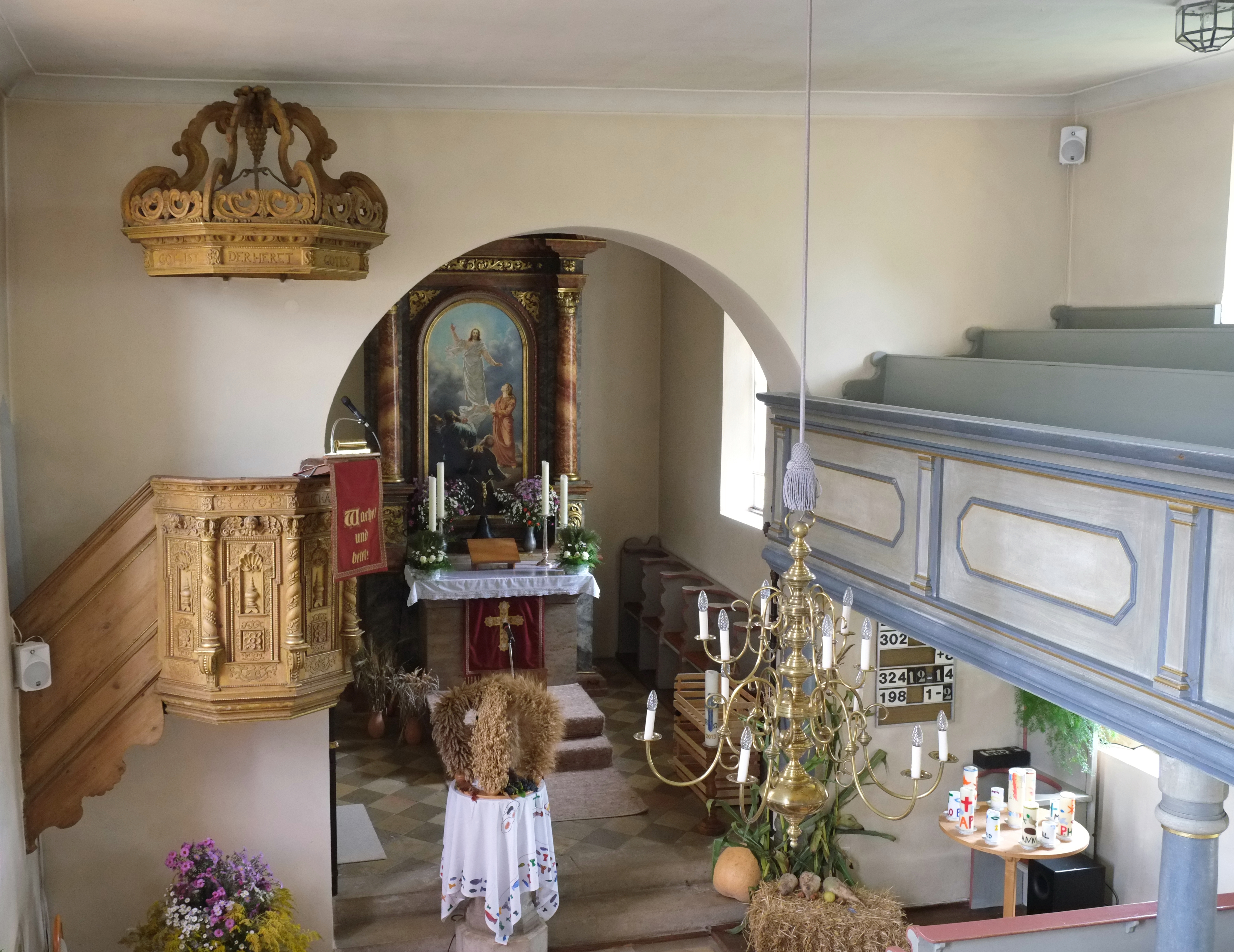 Kirche St. Willibald in Schambach (Treuchtlingen) im Landkreis Weißenburg-Gunzenhausen (Bayern/Deutschland)